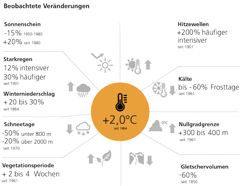 Klima in der Schweiz: beobachtete Veränderungen. NCCS (Hrsg.) 2018: CH2018 – Klimaszenarien für die Schweiz. National Centre for Climate Services, Zürich.